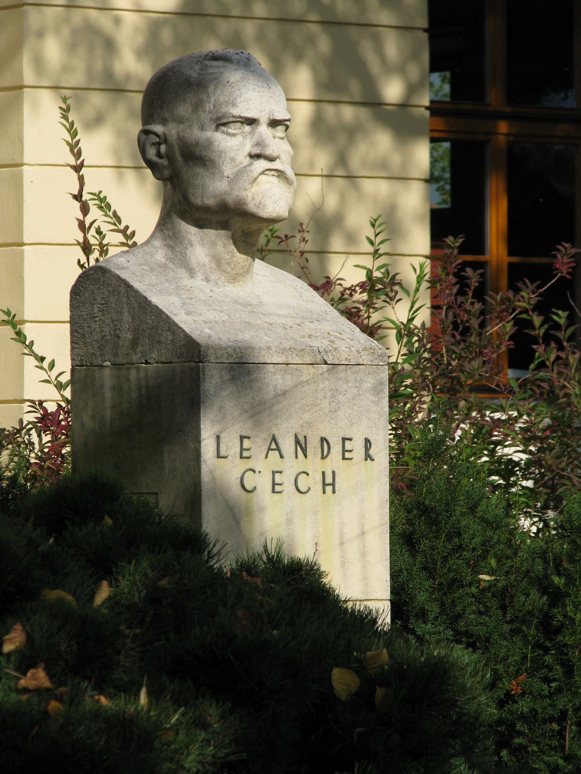 Socha - busta Leandra Čecha, Nové Město na Moravě